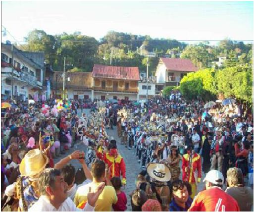 COSTUMBRES DE CALNALI 2010 CARNAVAL.JPG